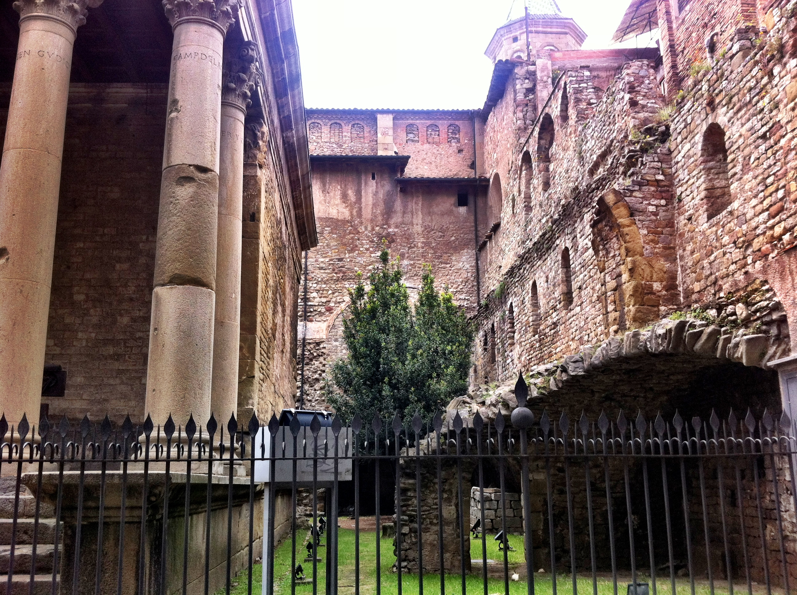 Tempe Romà i vestigis del sector nord del castell, mur septentrional.